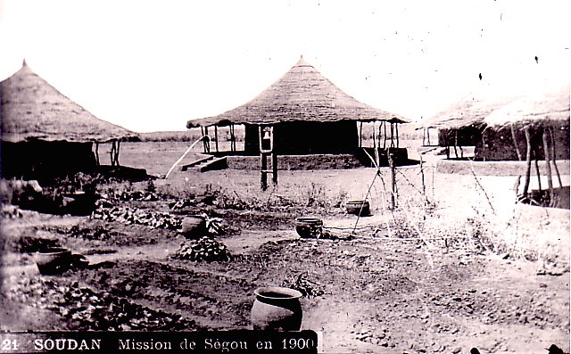 Mission des Pères blancs à Ségou (Soudan français) en 1900.